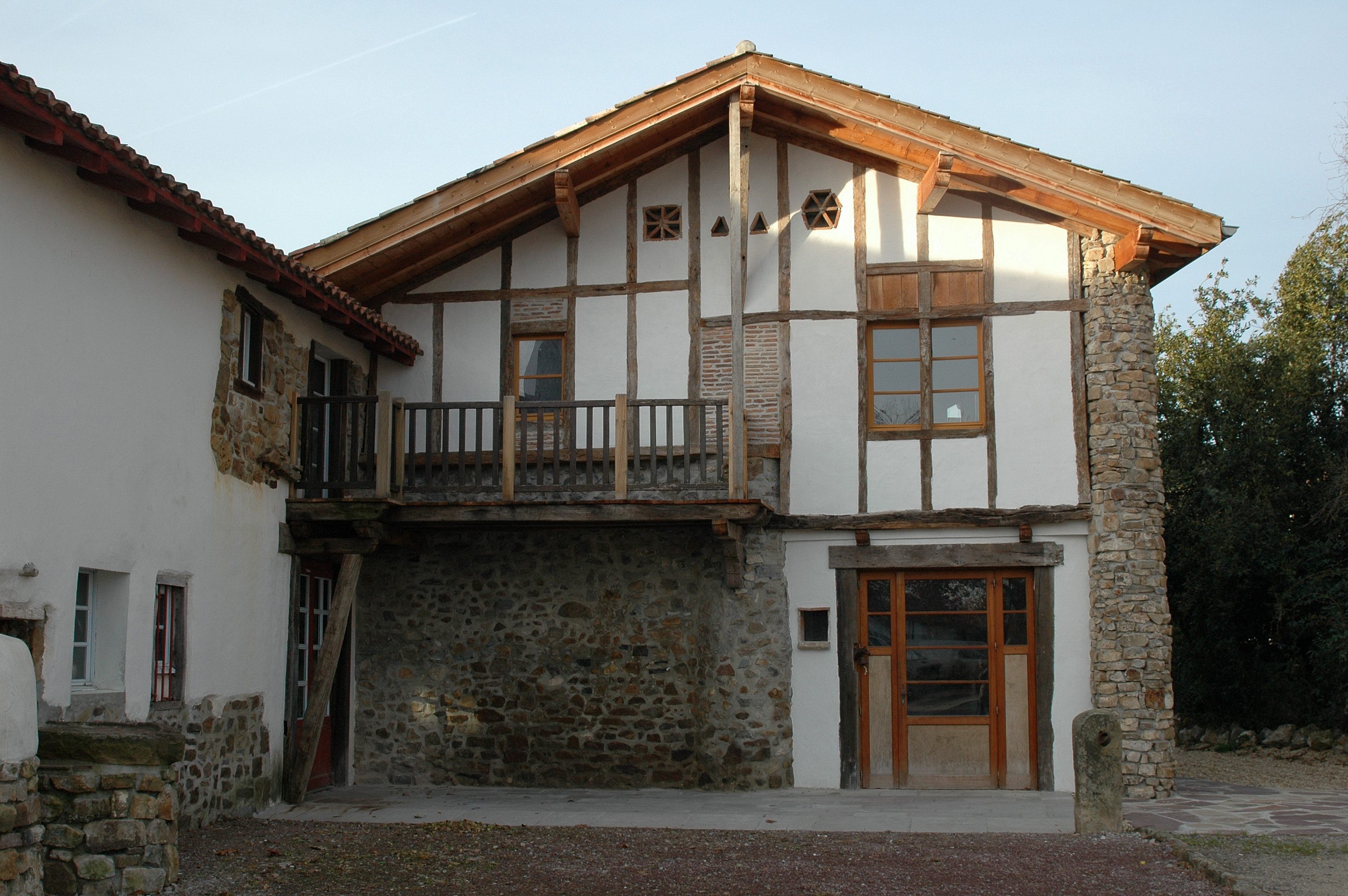 Saint-Pée-sur-Nivelle, quartier Ibarron, ferme labourdine. Photo prise le 31/12/06 par Harrieta171